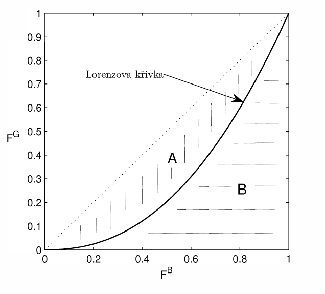 Giniho koeficient je číselná charakteristika diverzifikační schopnosti modelu.